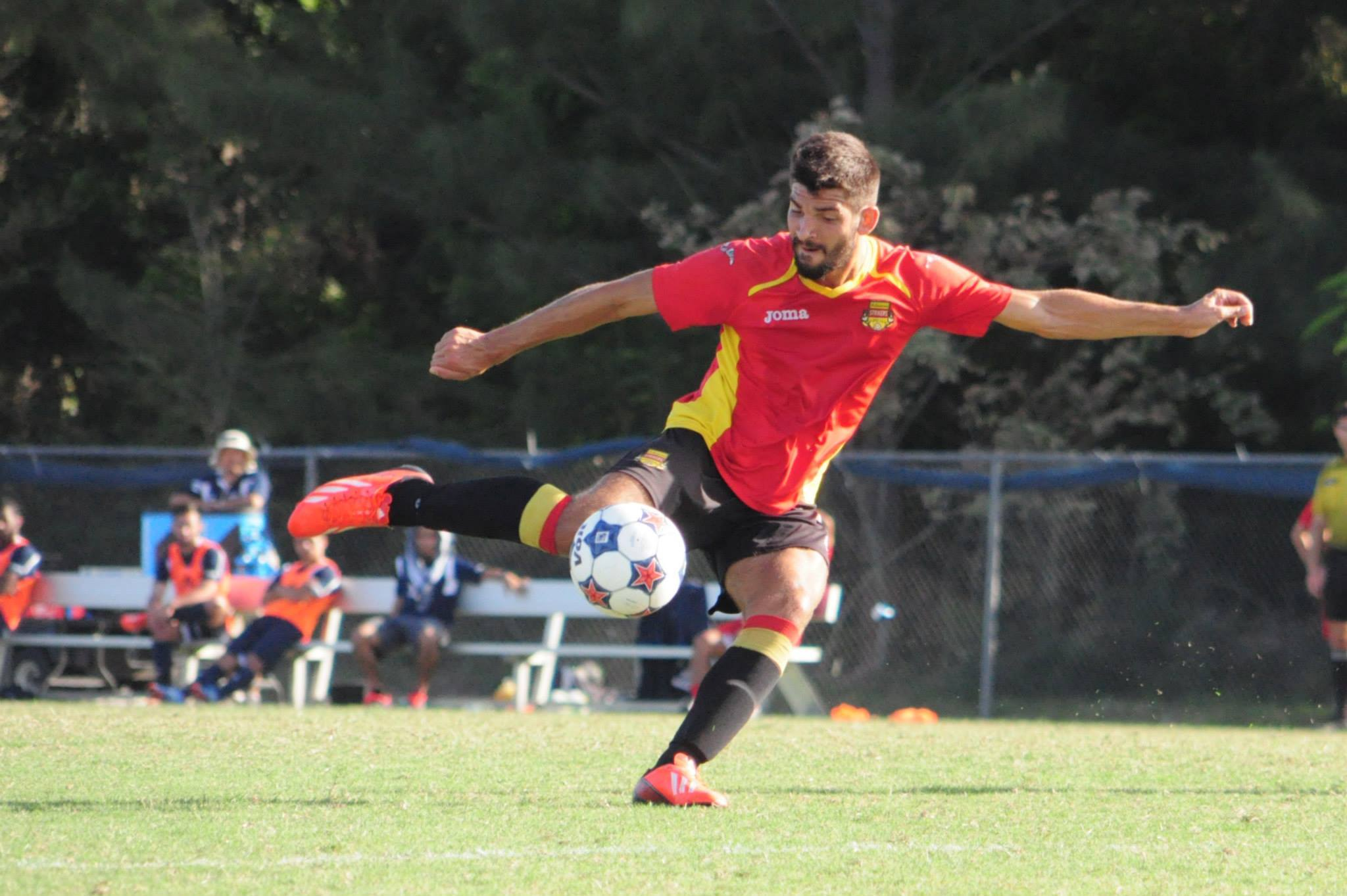 jogo contra a FAU